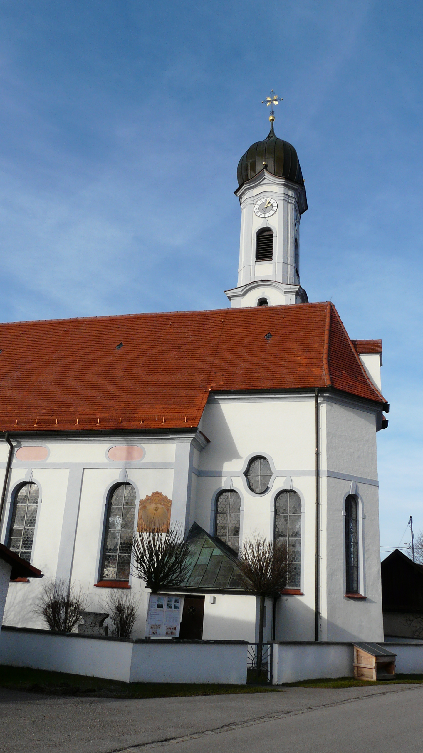 Kirche in Unterostendorf, Oberostendorf